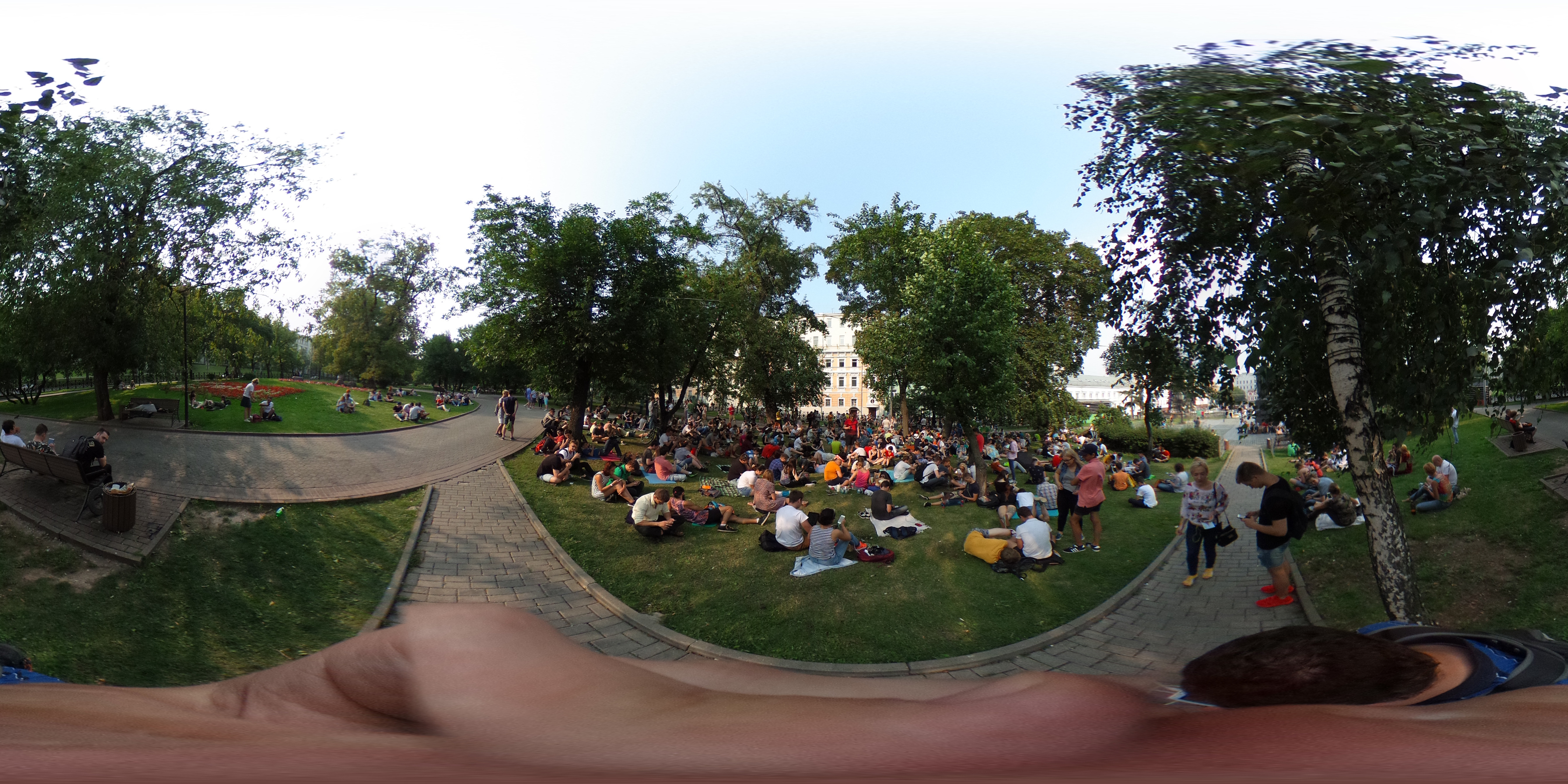 360° View in 360° panoramic viewer